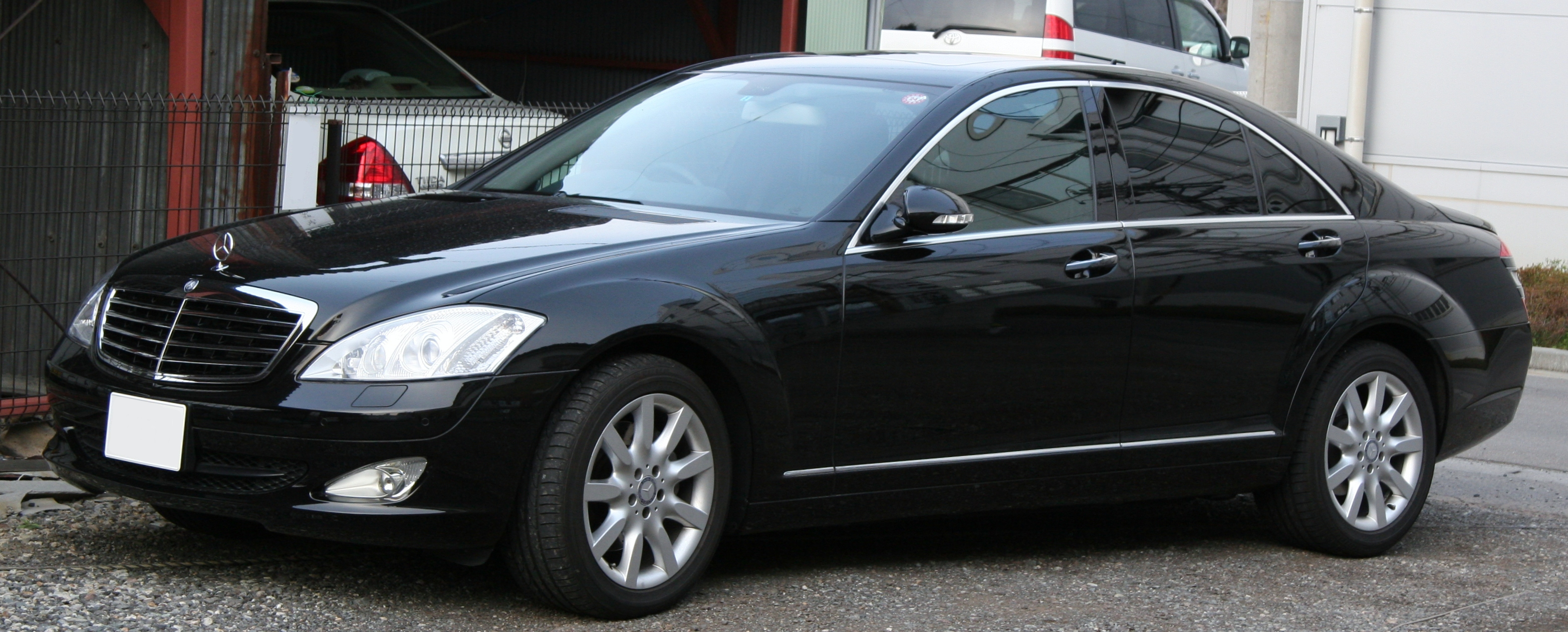 Mercedes-Benz S-Class